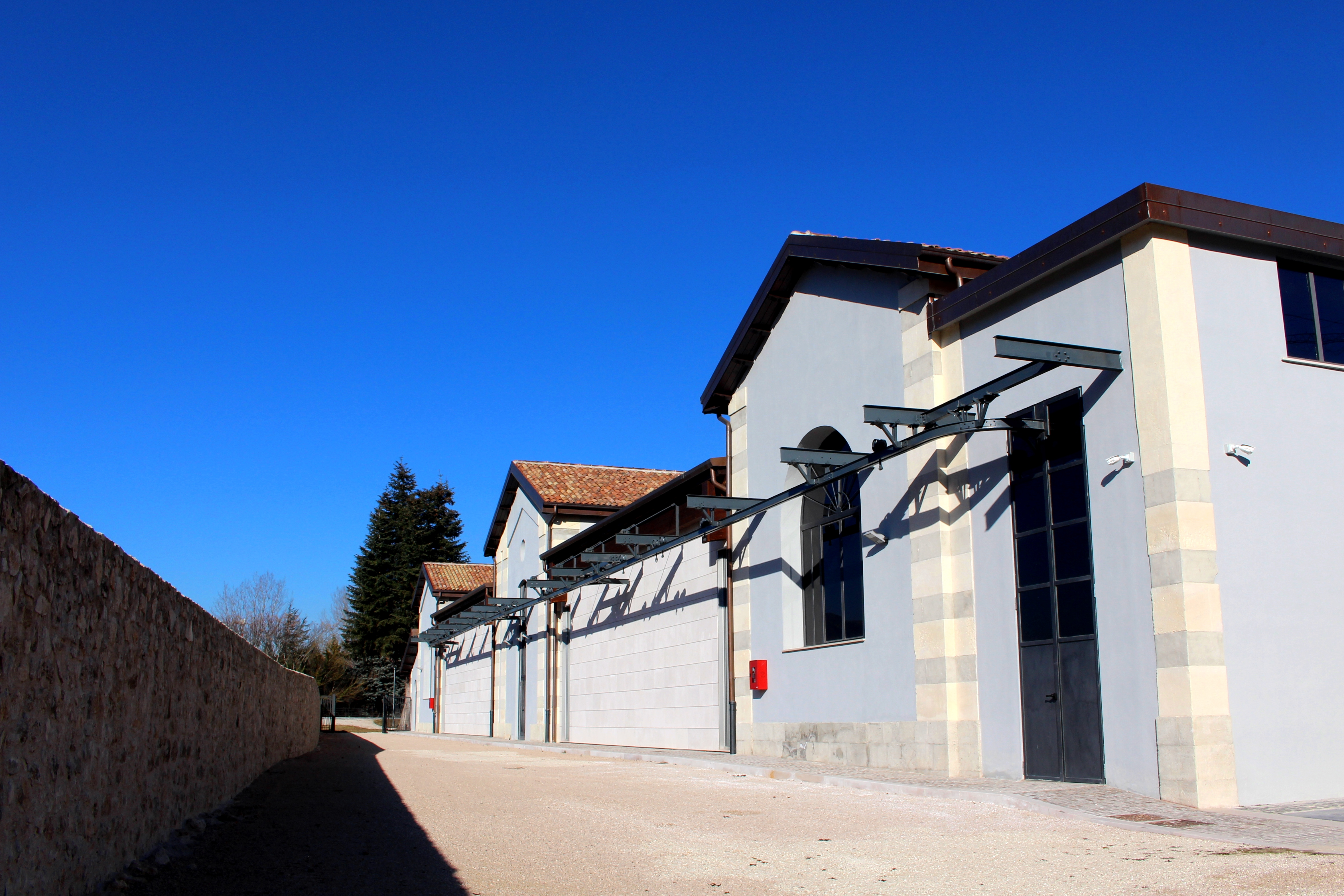 Ex mattatoio dell'Aquila, sede del Museo nazionale d'Abruzzo, dopo il restauro del 2012-2015.